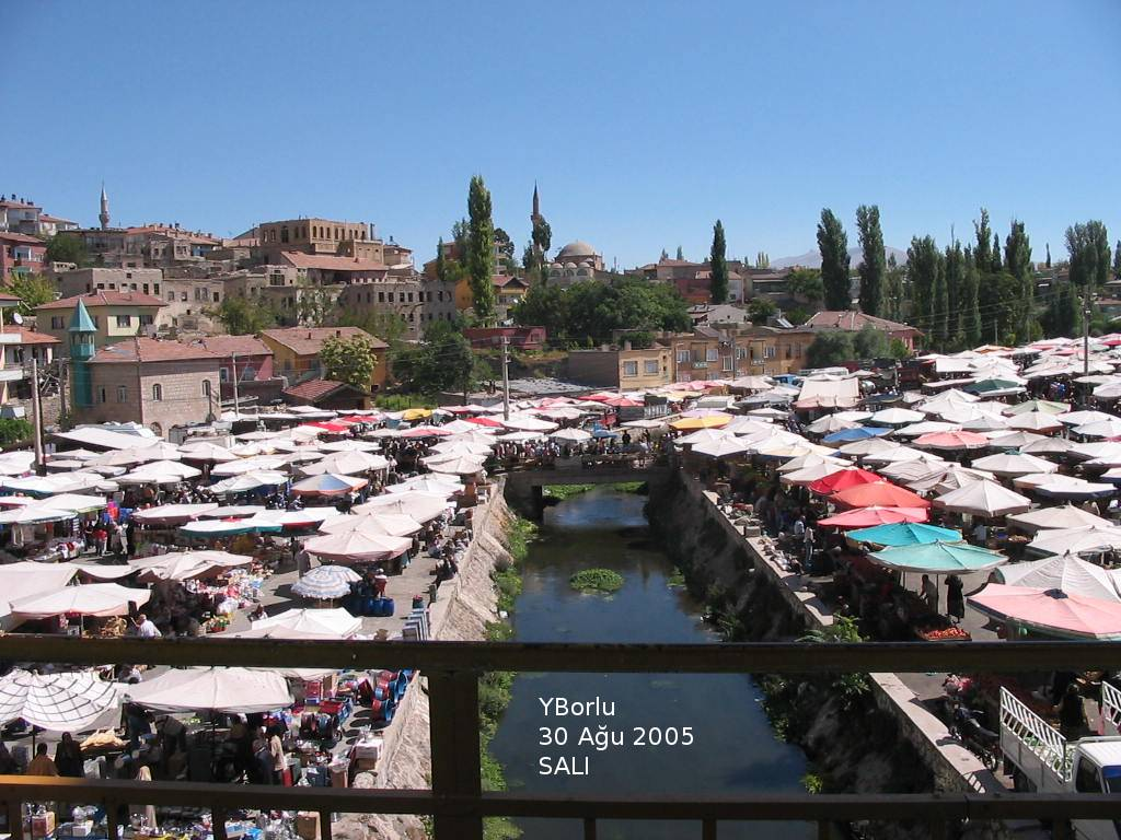 Geçti Borun Pazarı Sür Eşeği Niğde'ye Sözüne Konu olan Pazar